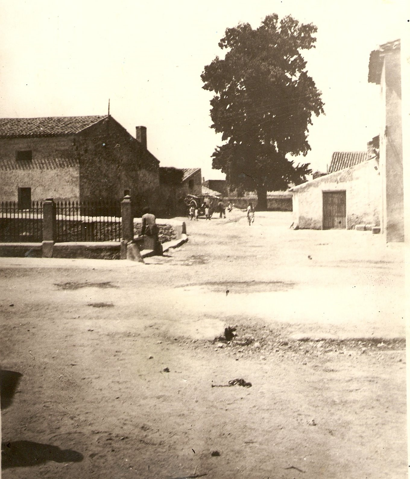 Fuente de cinco caños y álamo que, según la tradición, están en el origen del nombre de Fuente-Álamo; actualmente no se conserva ninguno de los dos.